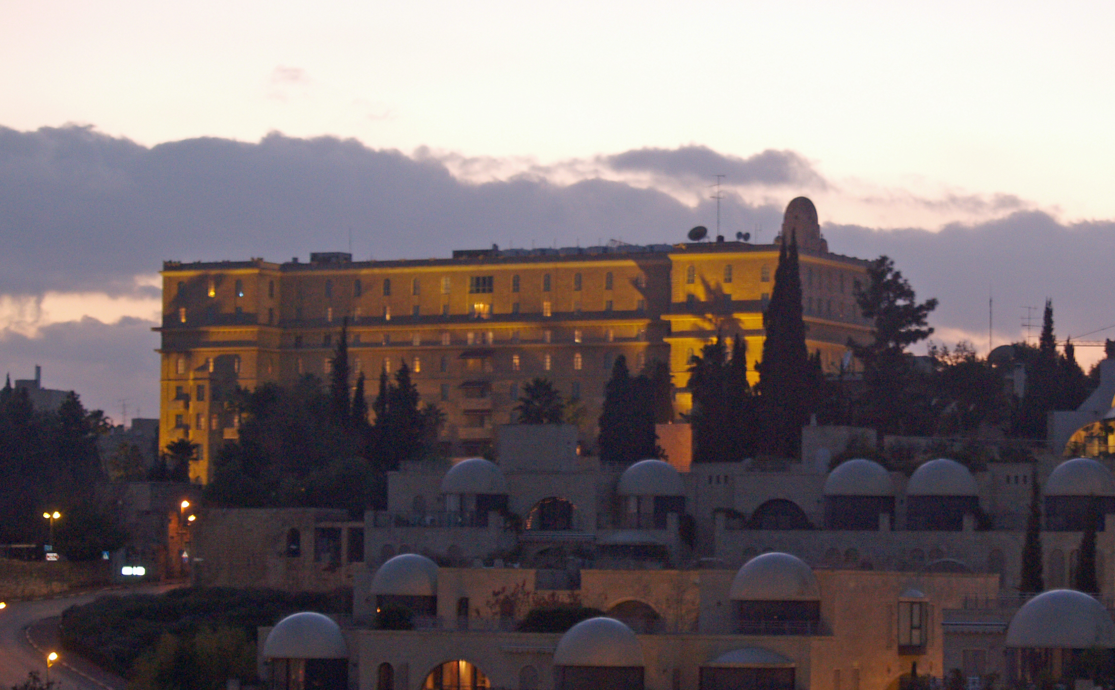 King David Hotel